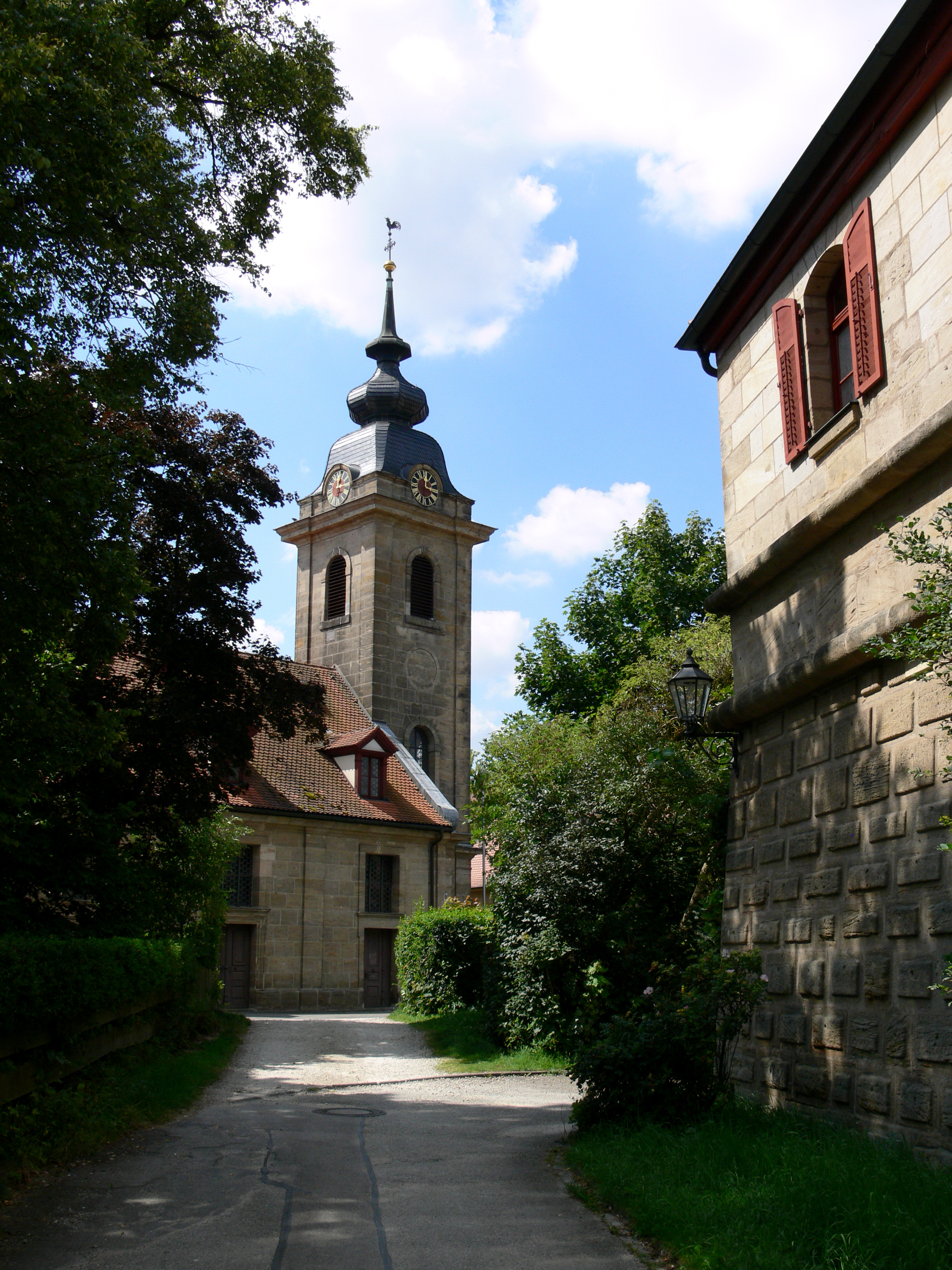 Lichtenau (Mittelfranken), Landkreis Ansbach Evangelische Dreieinigkeitskirche